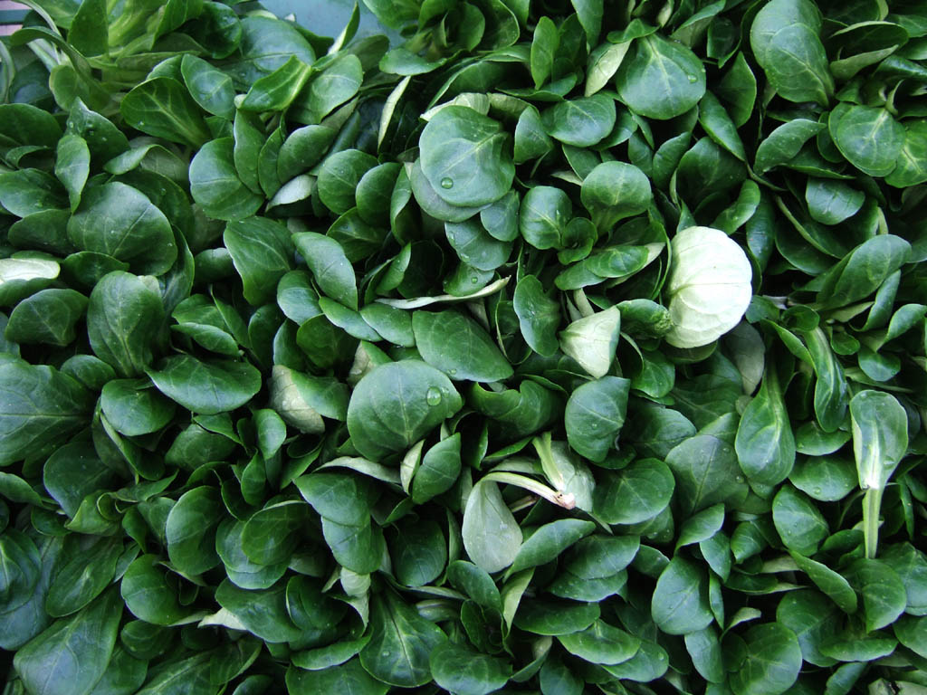 Vogerlsalat